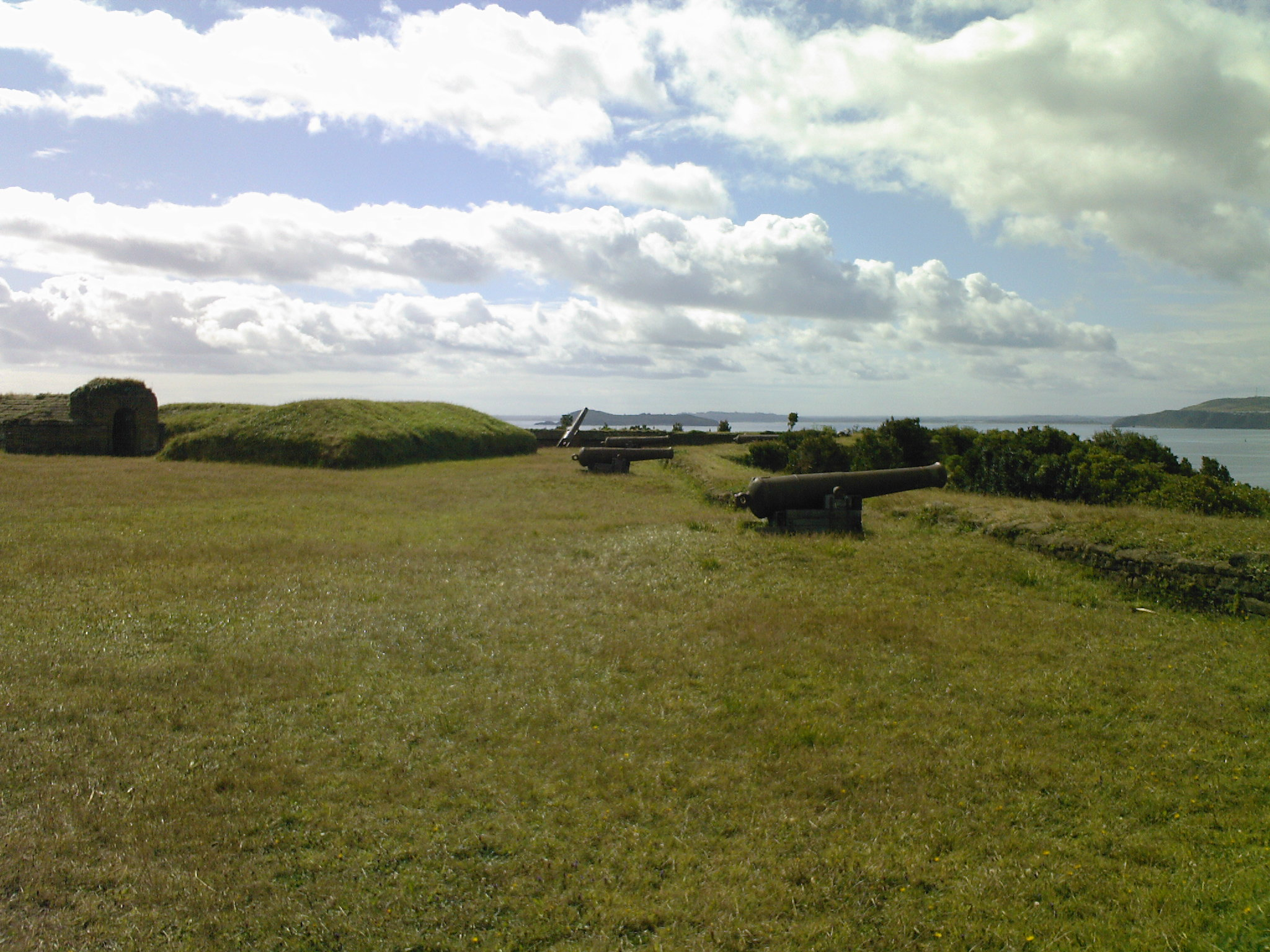 Vista de los restos del castillo y cañones aún emplazados This is a photo of a national monument in Chile: 702